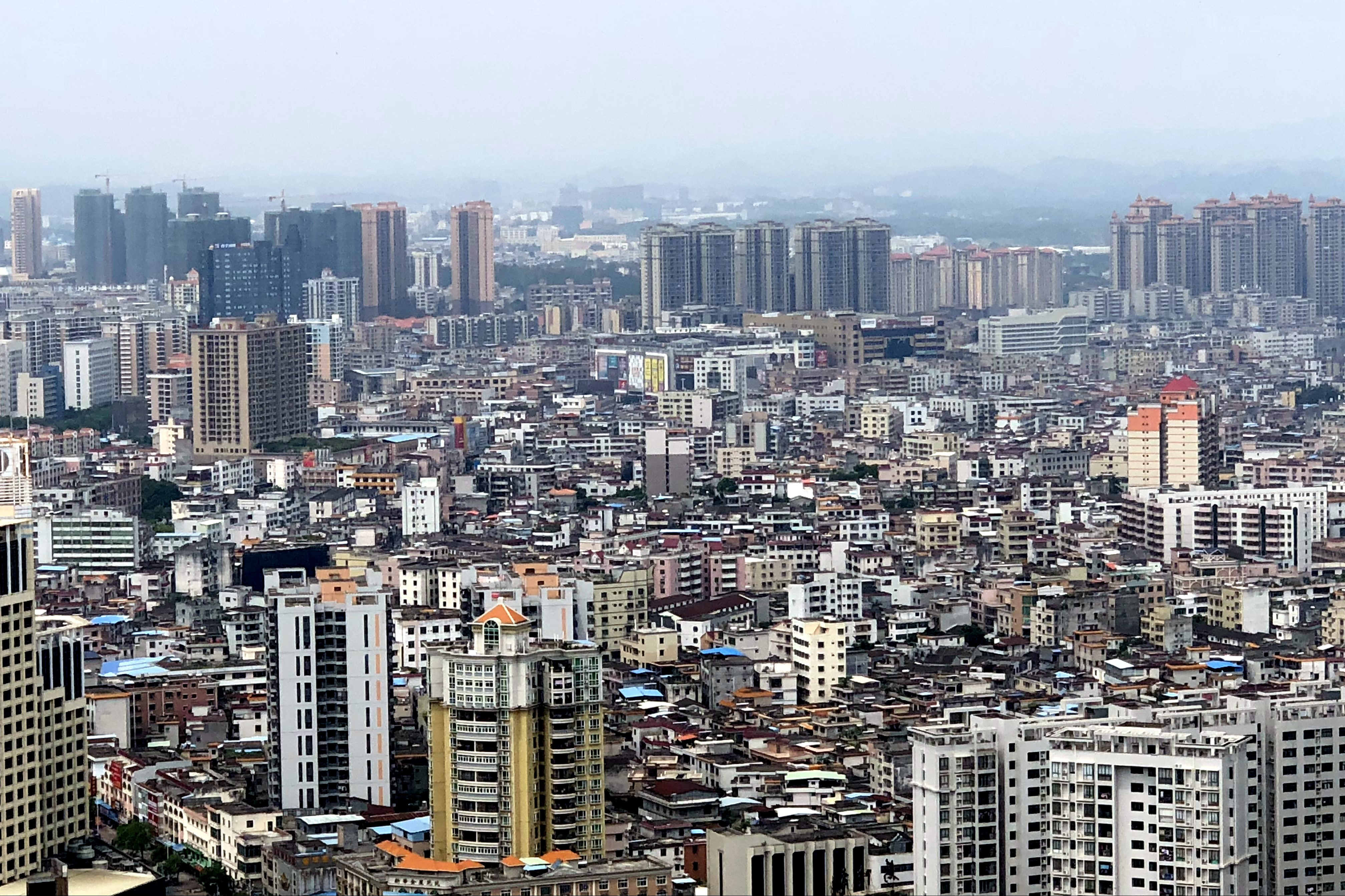 中文（中国大陆）: 飞鹅岭眺望惠东县城